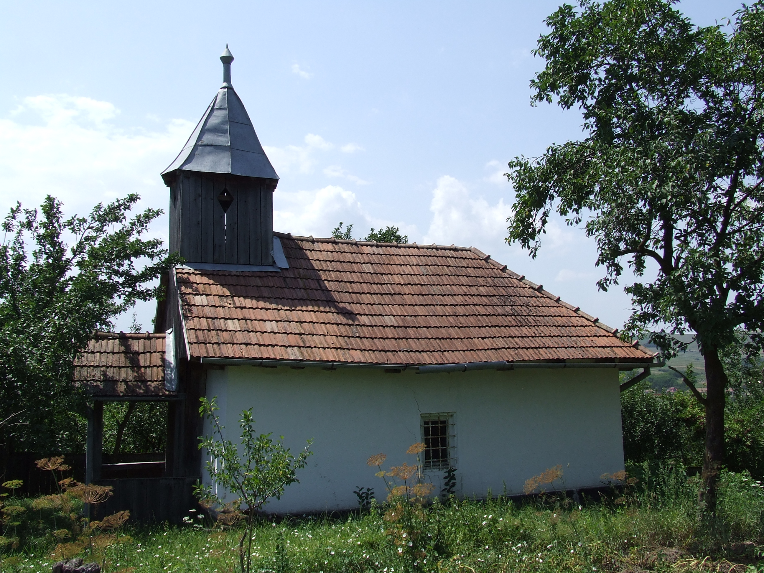 Biserica de lemn, reformată de rit calvin din Ţagu, Bistriţa-Năsăud